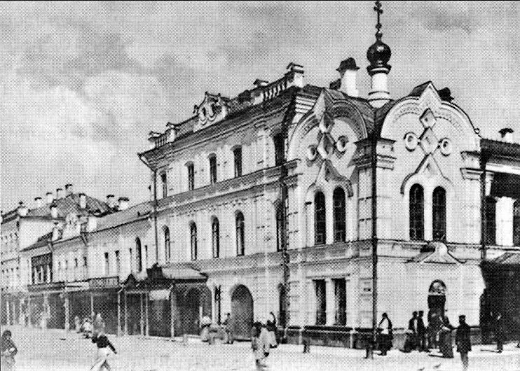 Подворье Югской Дорофеевой пустыни на Крестовой улице в Рыбинске